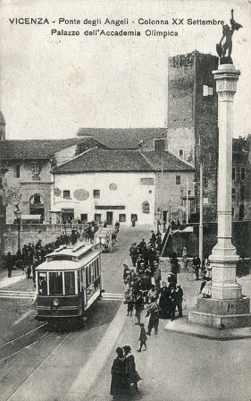 Vicenza, Corso Palladio